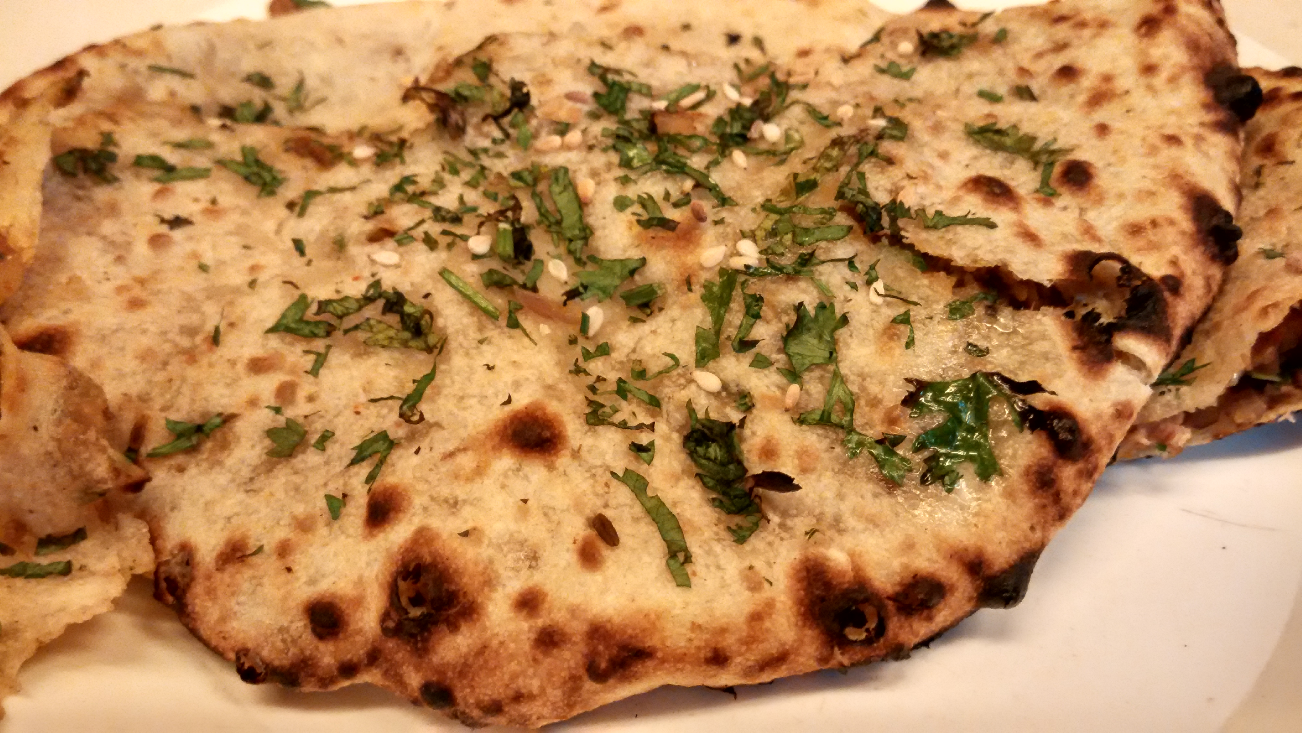 ஆட்டுக்கறி குல்ச்சா.